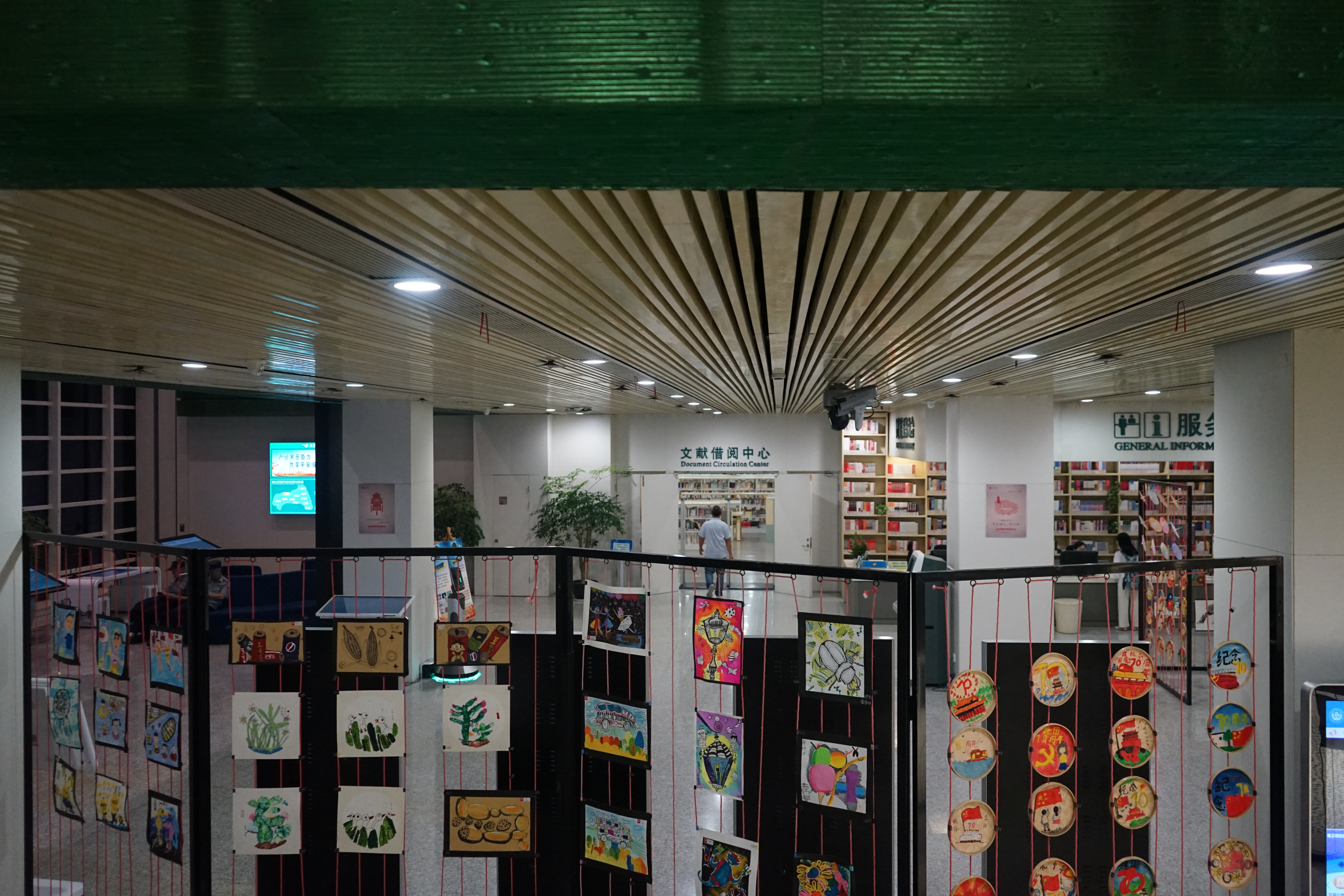 中文（中国大陆）: 海宁图书馆